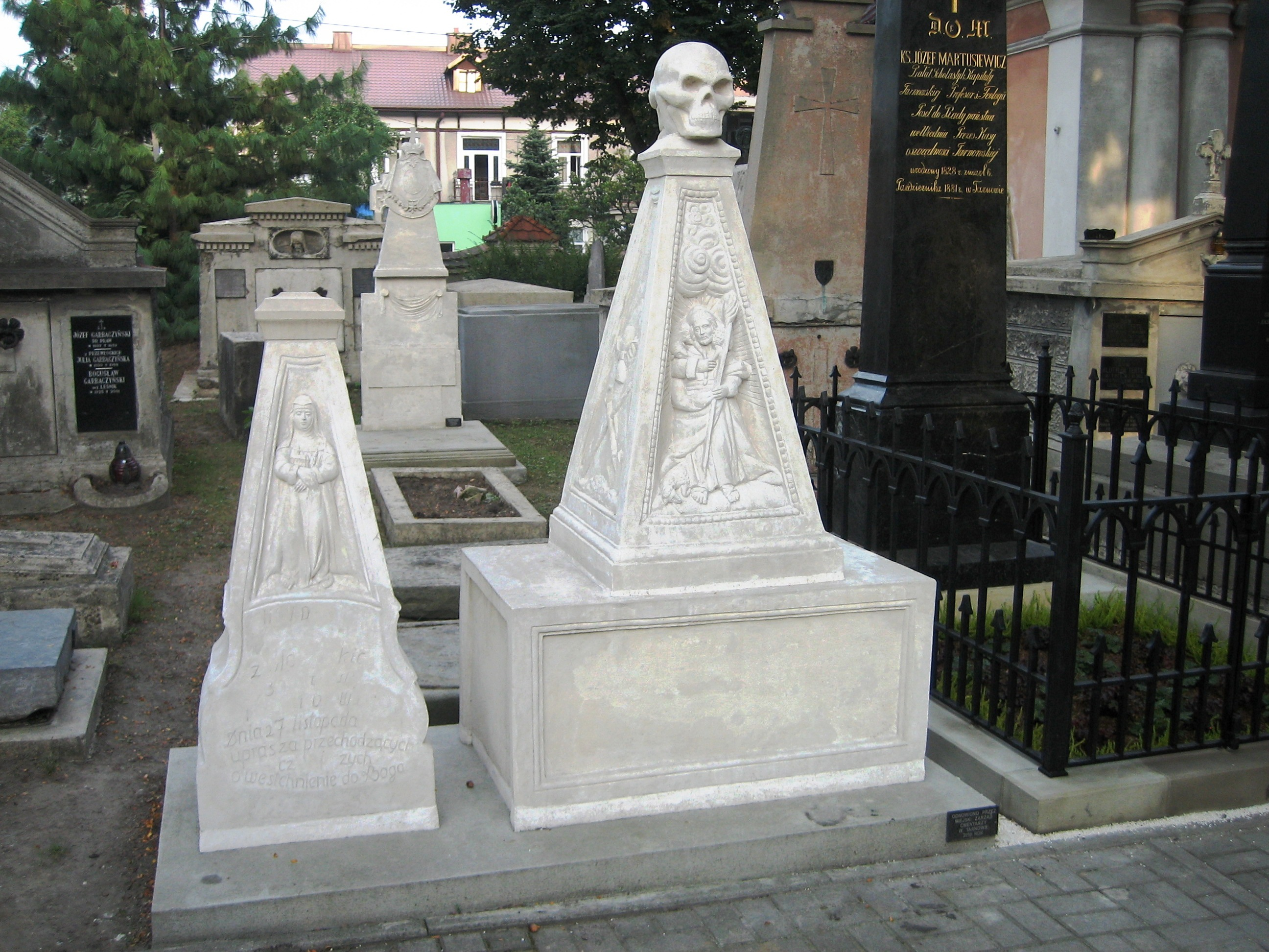 Cmentarz stary w Tarnowie, ul. Narutowicza (Konarskiego)